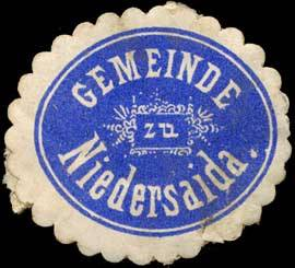 Sealing stamp Title: Gemeinde zu Niedersaida Description: blau, weiß Place: Niedersaida size: 3x3 cm